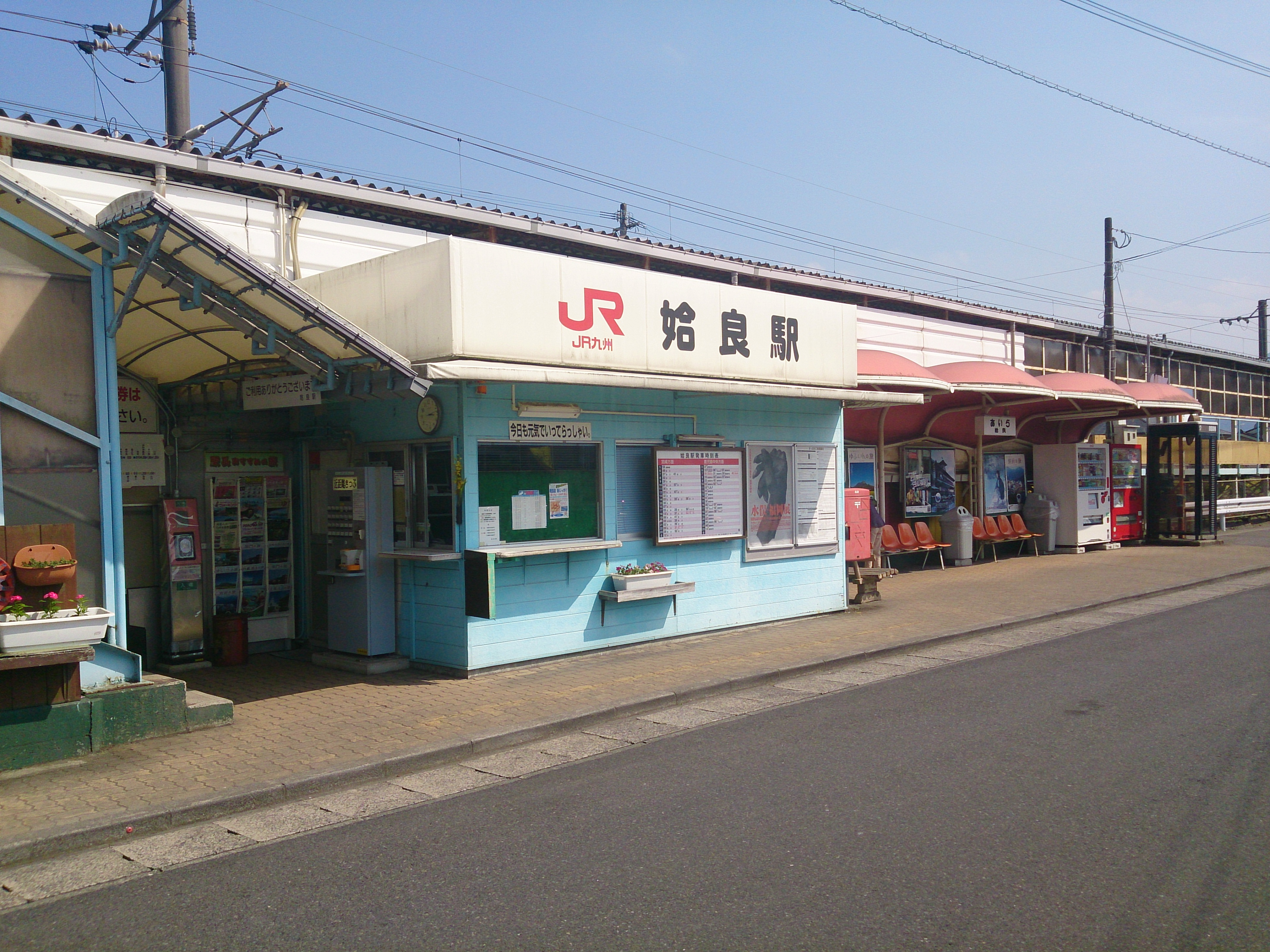 姶良駅 駅舎